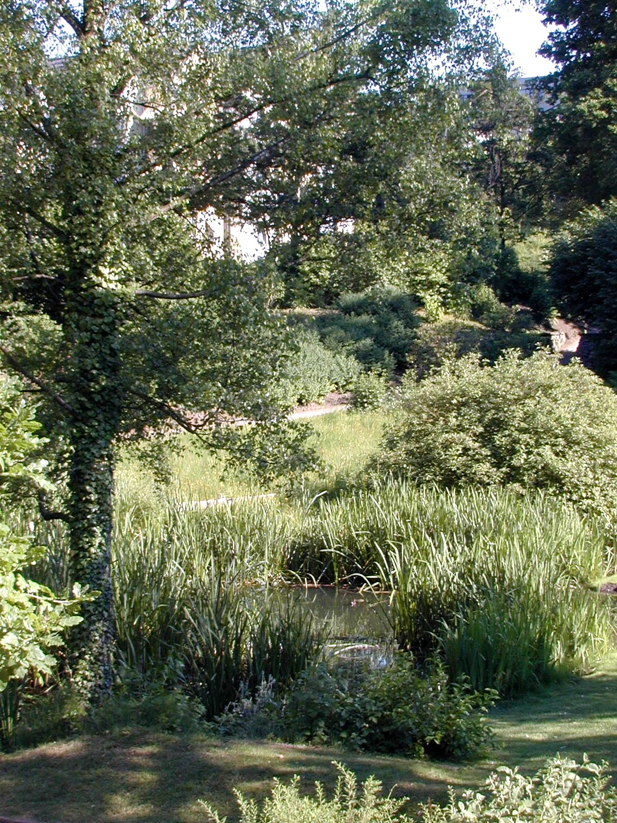 Witten, Teich im Schwesternpark